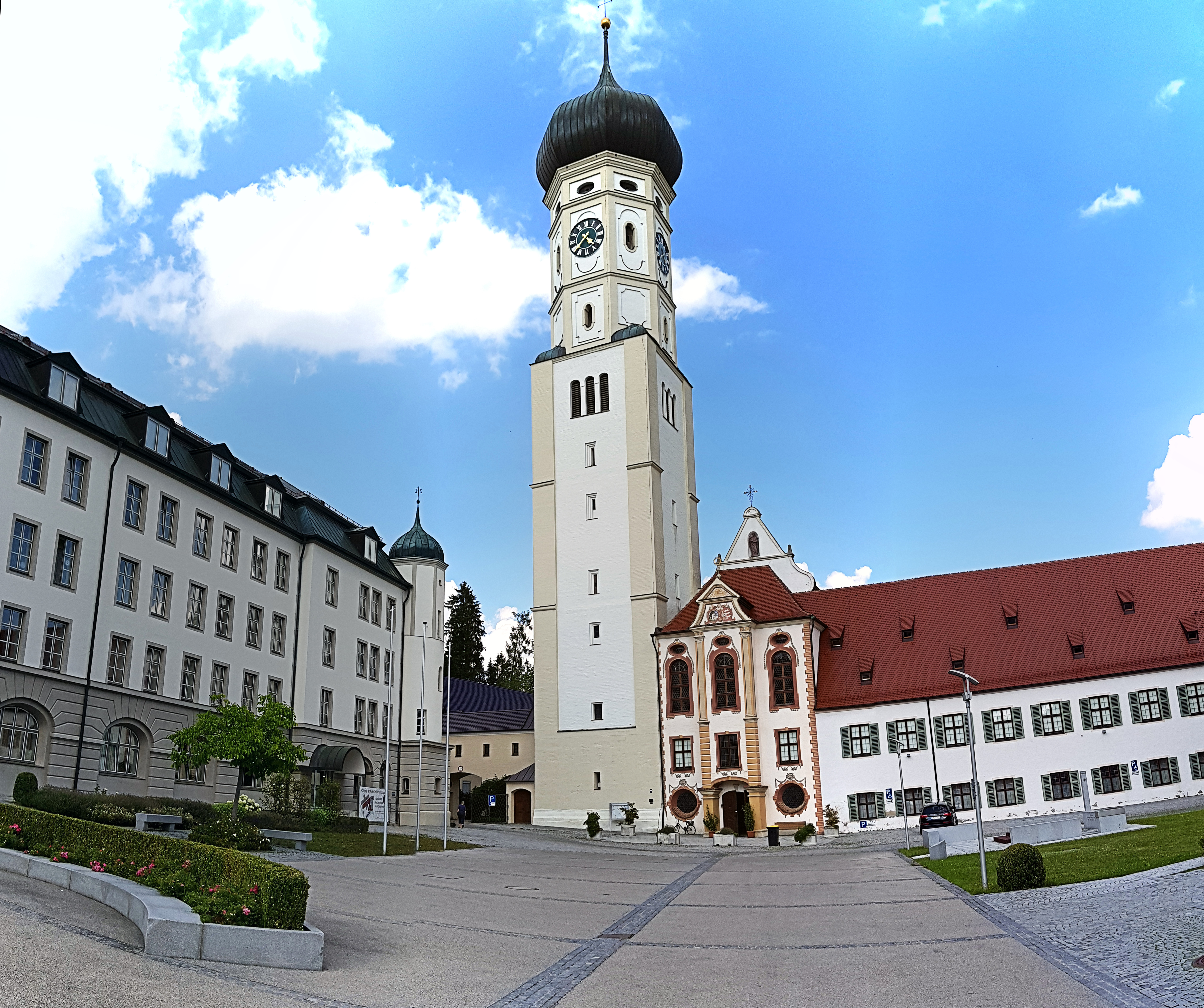 Klosterkirche Ursberg im Landkreis Günzburg im bayerischen Regierungsbezirk Schwaben